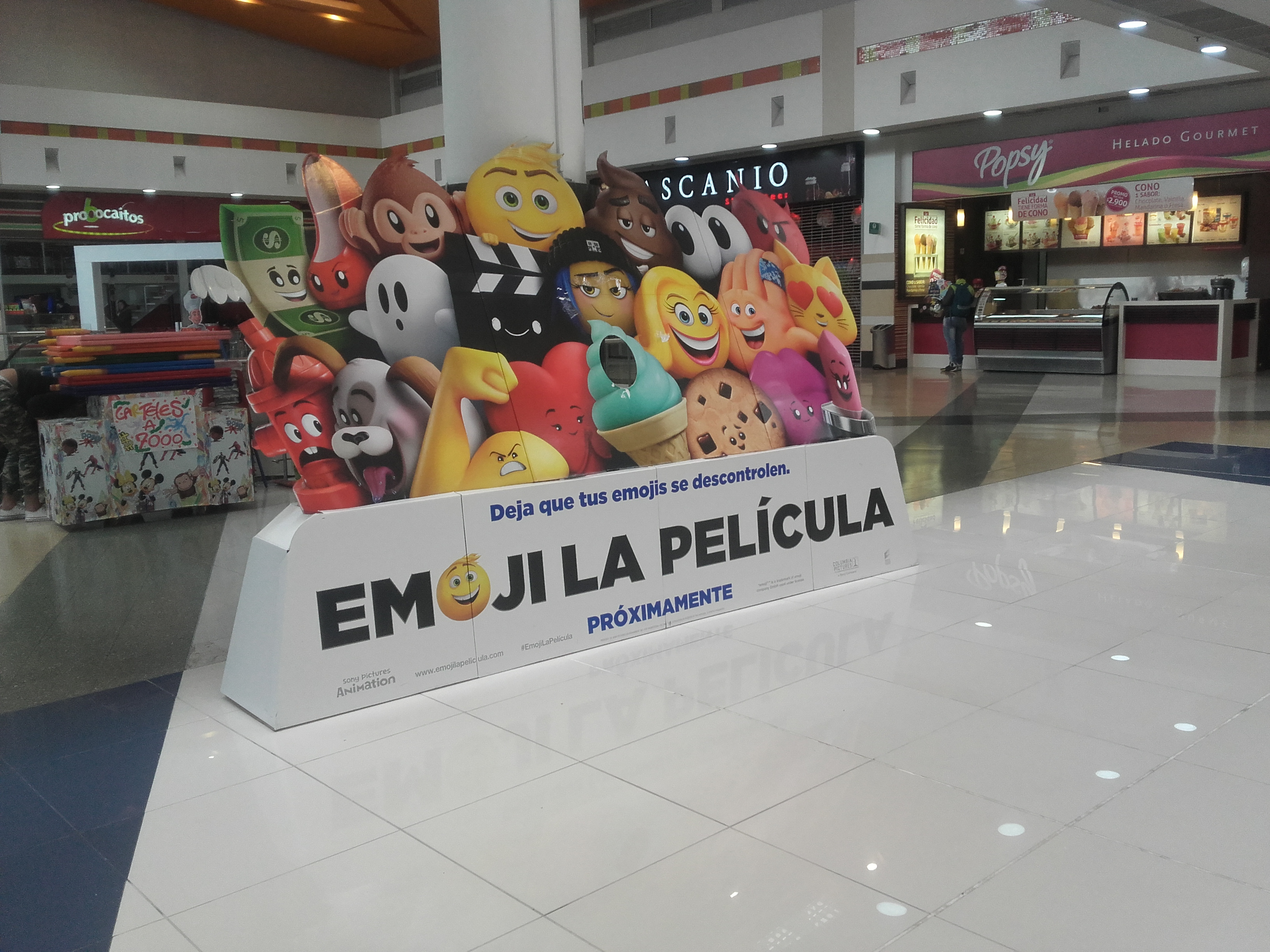 nfkfkfkfnfkfk